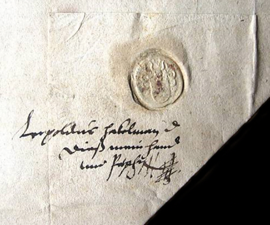 Siegel und eigenhändige Unterschrift von Leopold Hackelmann auf einer Quittung an die Stadt Neustadt an der Orla über den Empfang von Zinsen.